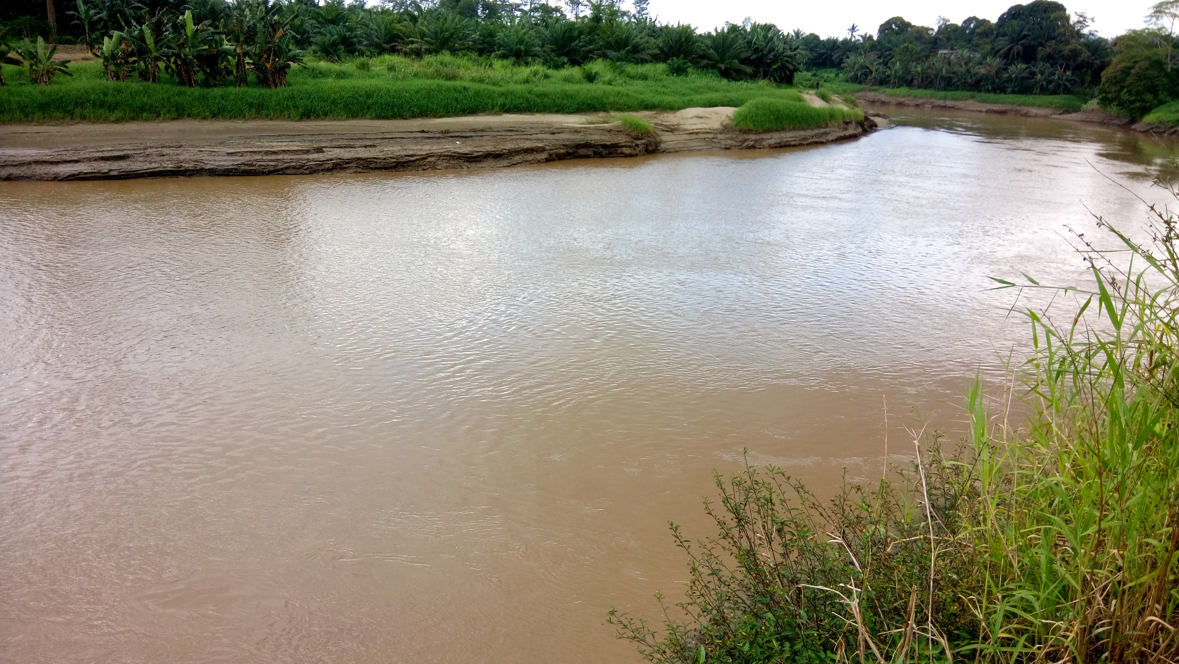 Sungai yang terdapat di Lahad Datu